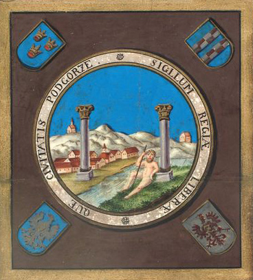 Herb miasta Podgórza nadany 3 sierpnia 1808 przez cesarza Franciszka I. Oryginał w Archiwum Państwowym w Krakowie